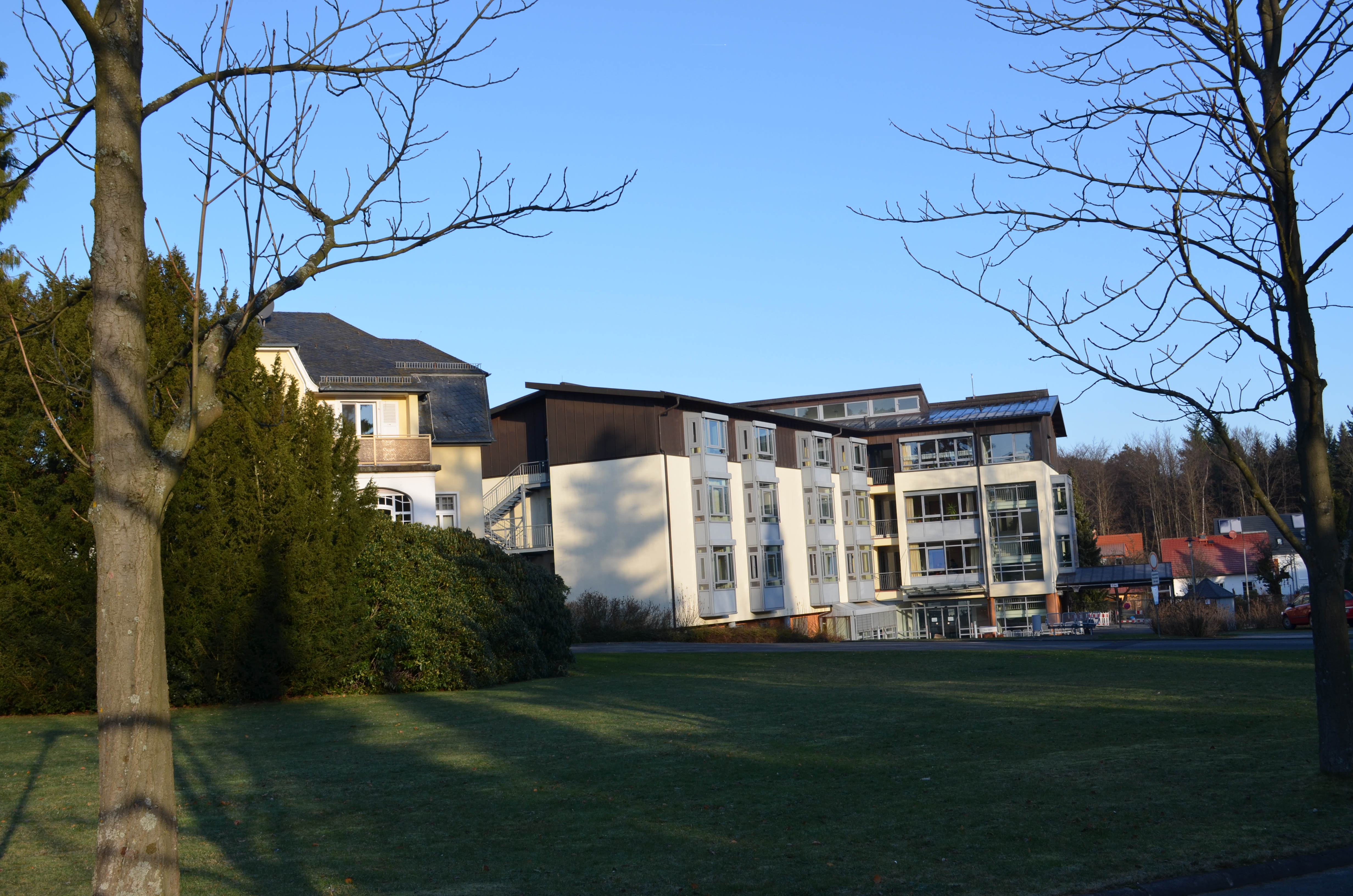 Oberursel, Klinik Hohemark